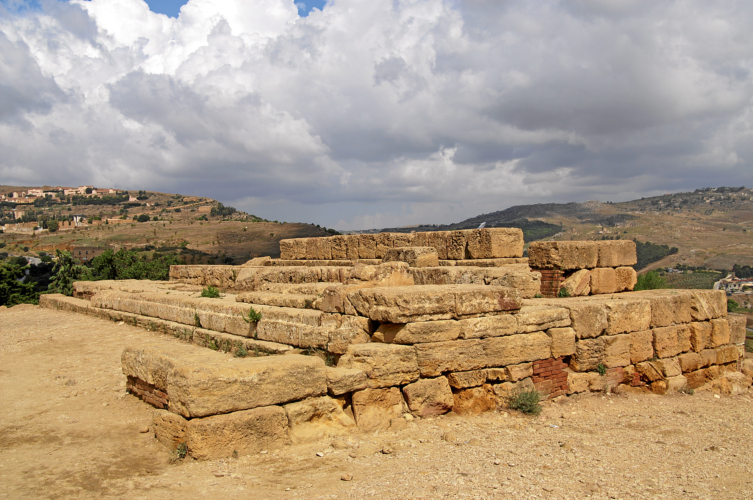 Valle dei Templi: Altar beim Tempel der Hera Lacinia